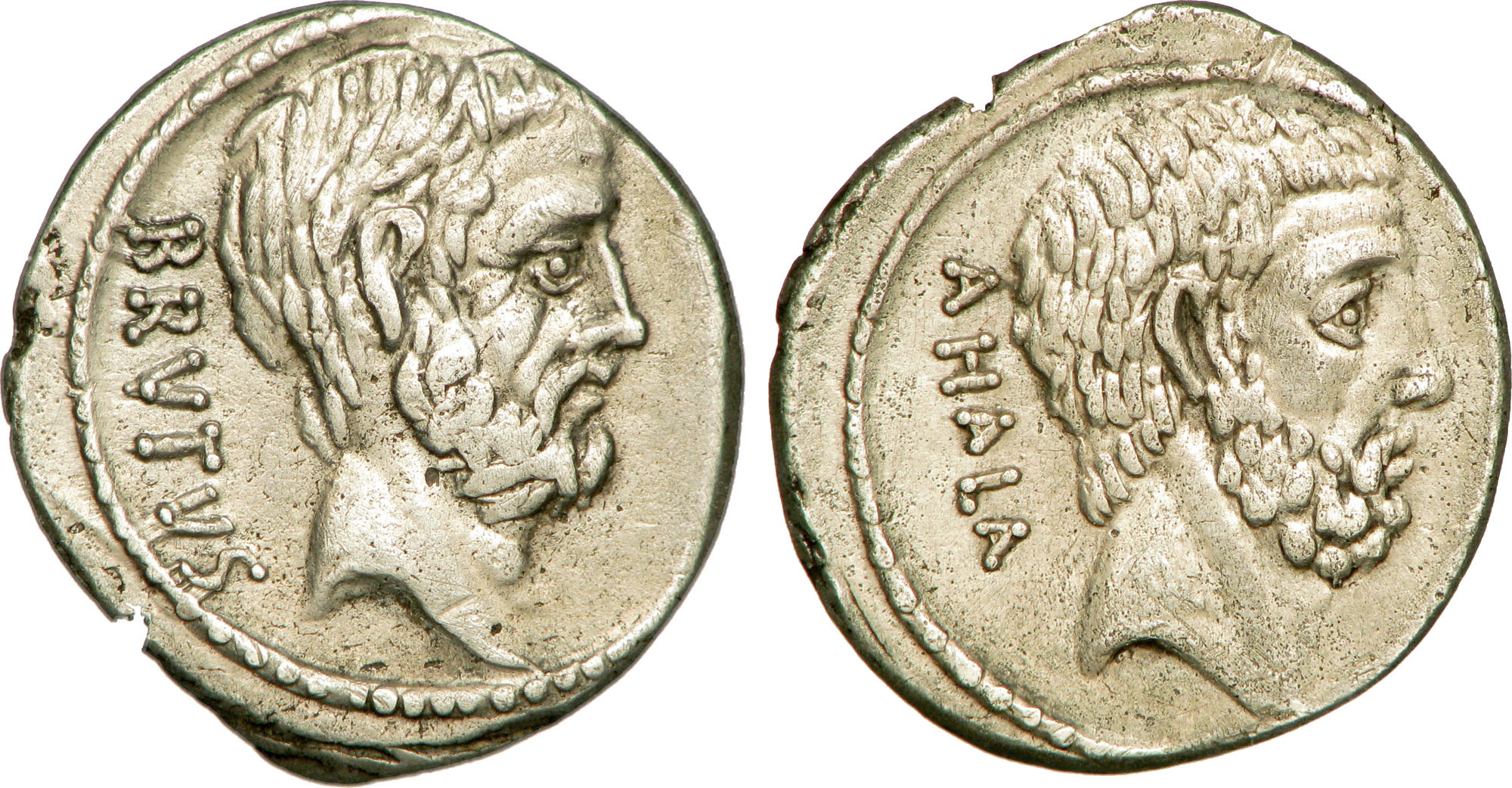 Nom de l'atelier : Rome Métal : argent Titre en millième : 950‰ Diamètre : 19mm Axe des coins : 6h. Poids : 4,06g. Titulature avers : BRVTVS. Description avers : Tête nue et barbue de Brutus l'ancien à droite. Traduction avers : “Brutus”, Brutus, qui chassa les rois hors de Rome Brutus). Titulature revers : AHALA. Description revers : Tête nue et barbue d'Ahala à droite. Traduction revers : “Ahala”, (Ahala), qui tua Spurius Mealius sous l'accusation d'aspirer à la royauté.